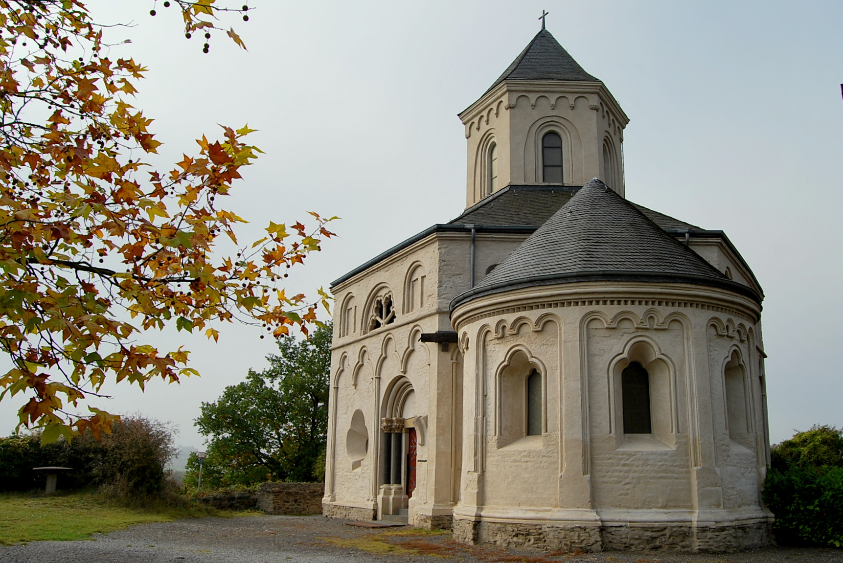 Kobern-Gondorf, Matthiaskapelle